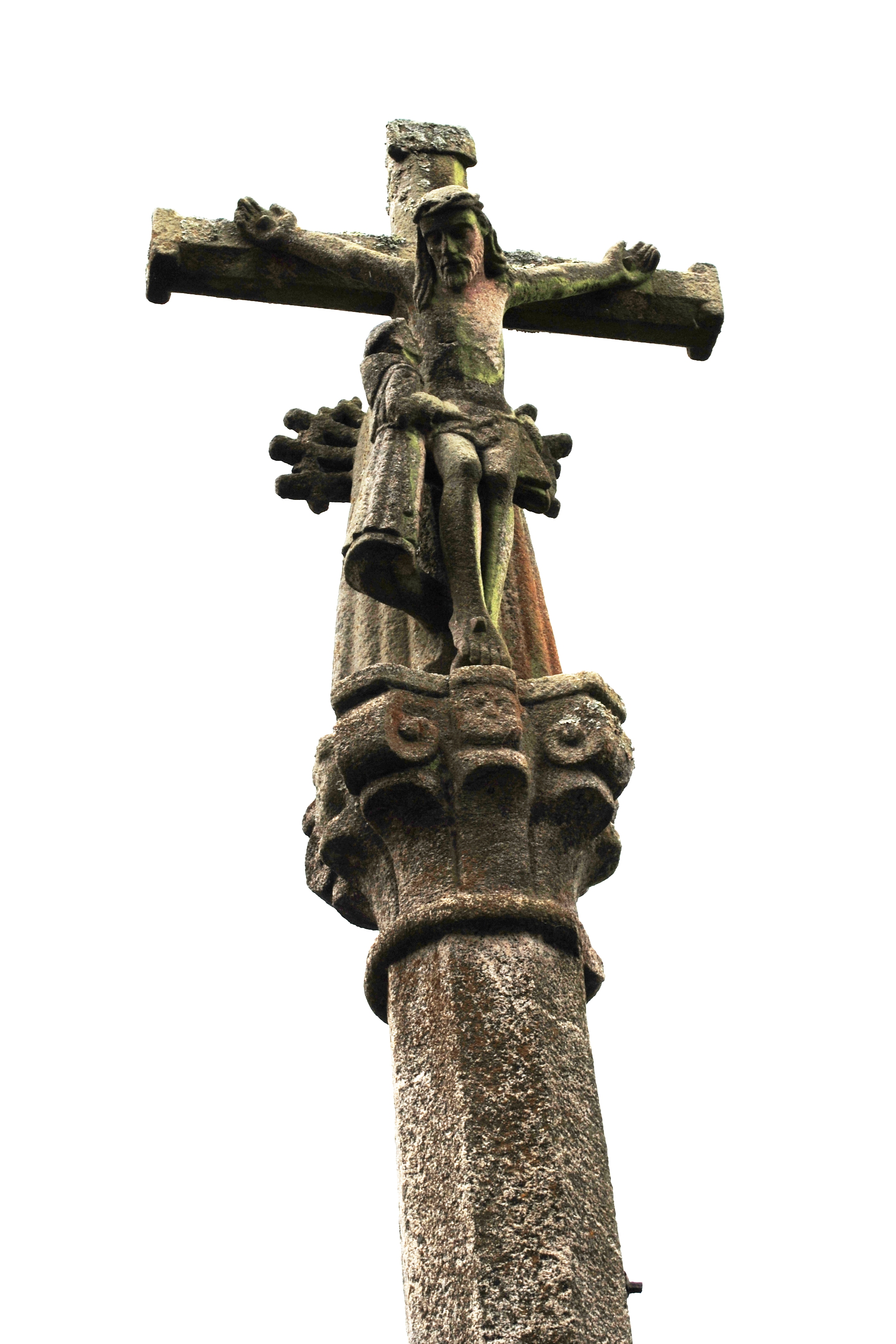 Cruceiro no adro da igrexa de Reboreda, Redondela